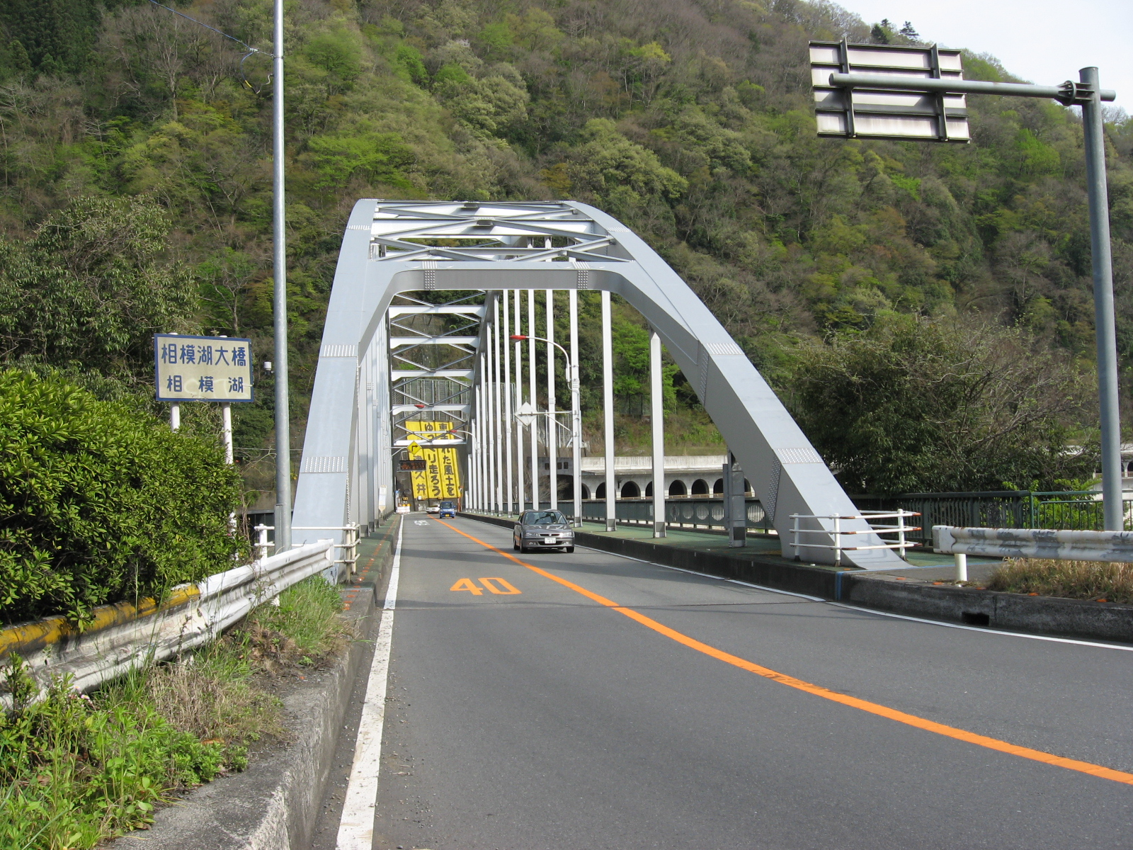 相模湖に架かる相模湖大橋